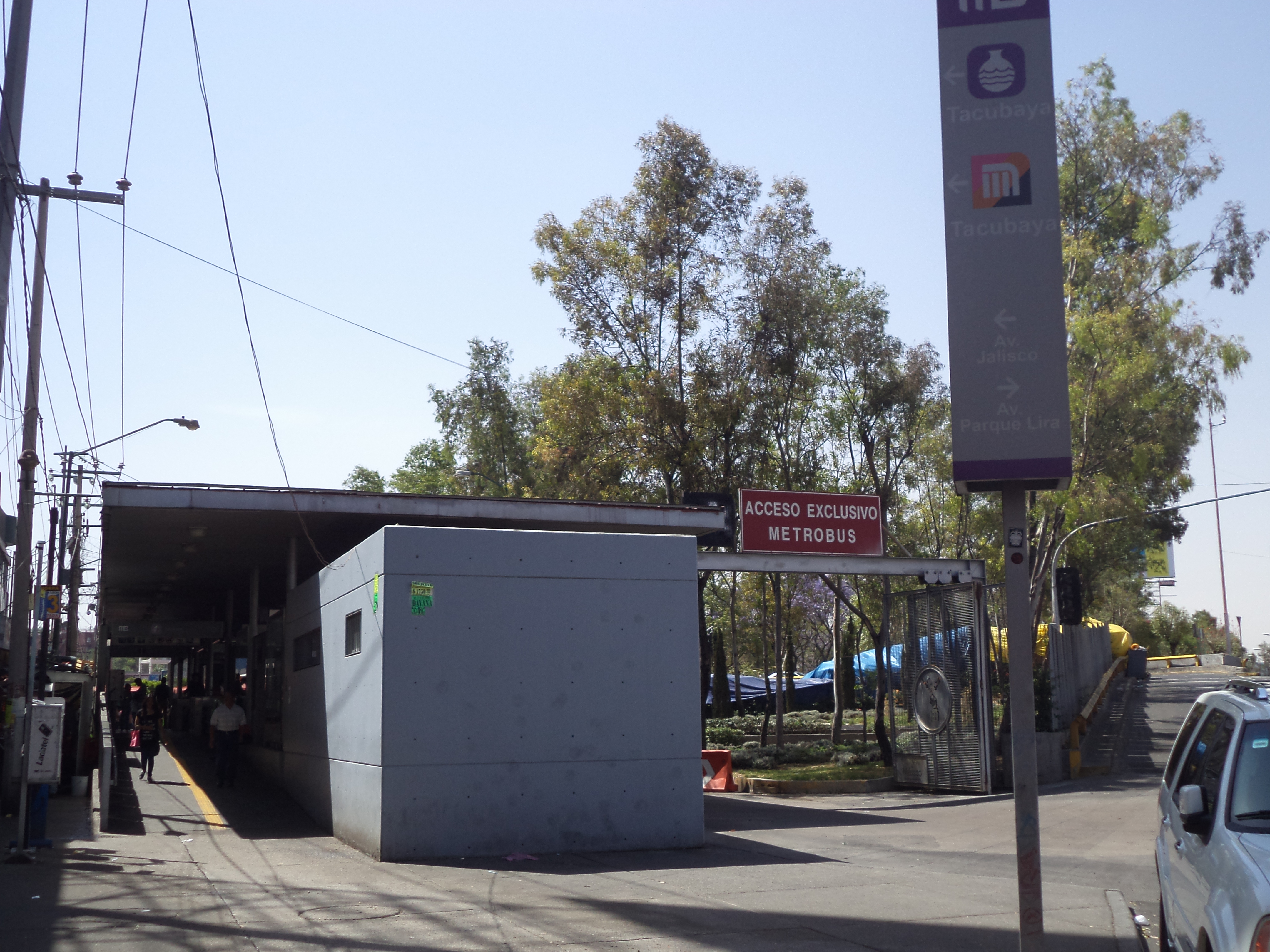 Estacion del Metrobus Tacubaya